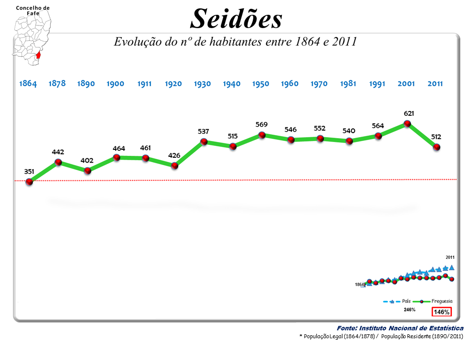 Censos 1864/2011